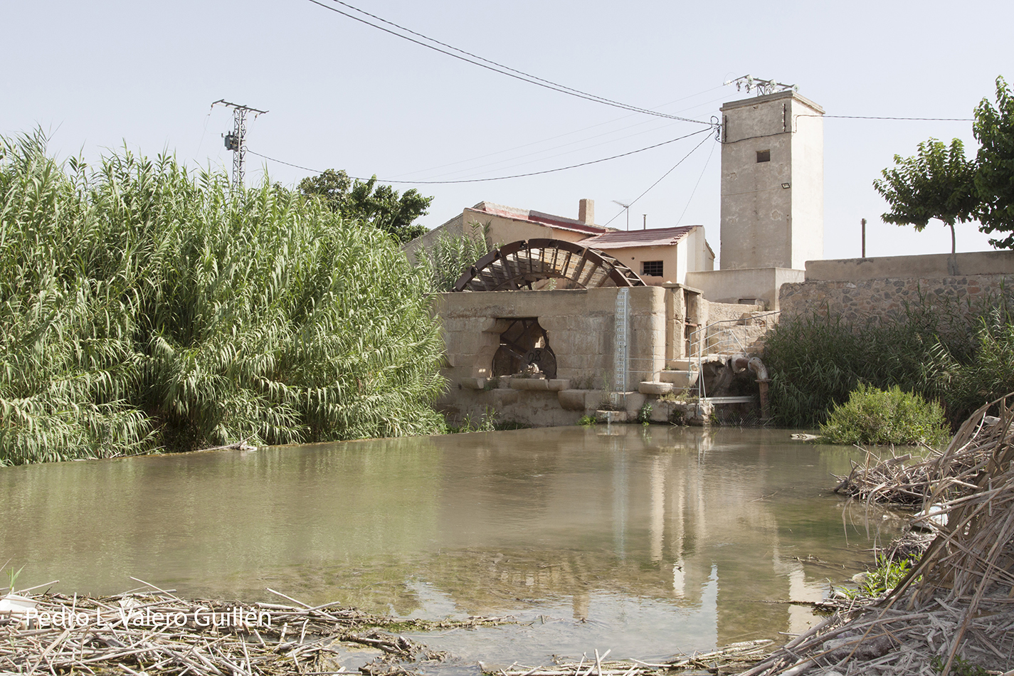 Noria de Moquita en Las Norias (Desamparados, Orihuela).